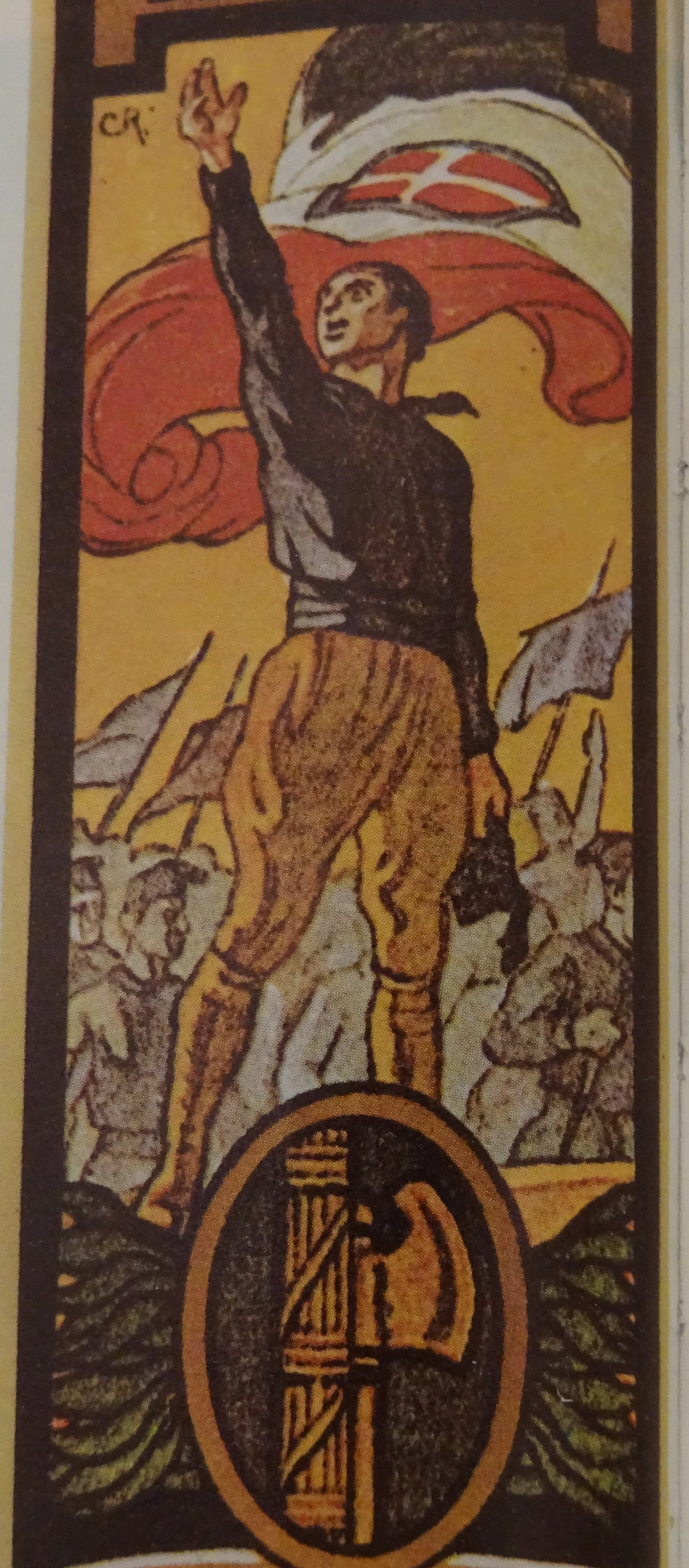 Immagine da un segnalibro scolastico di epoca fascista che raffigura un uomo in camicia nera che saluta romanamente, al di sopra di un fascio littorio